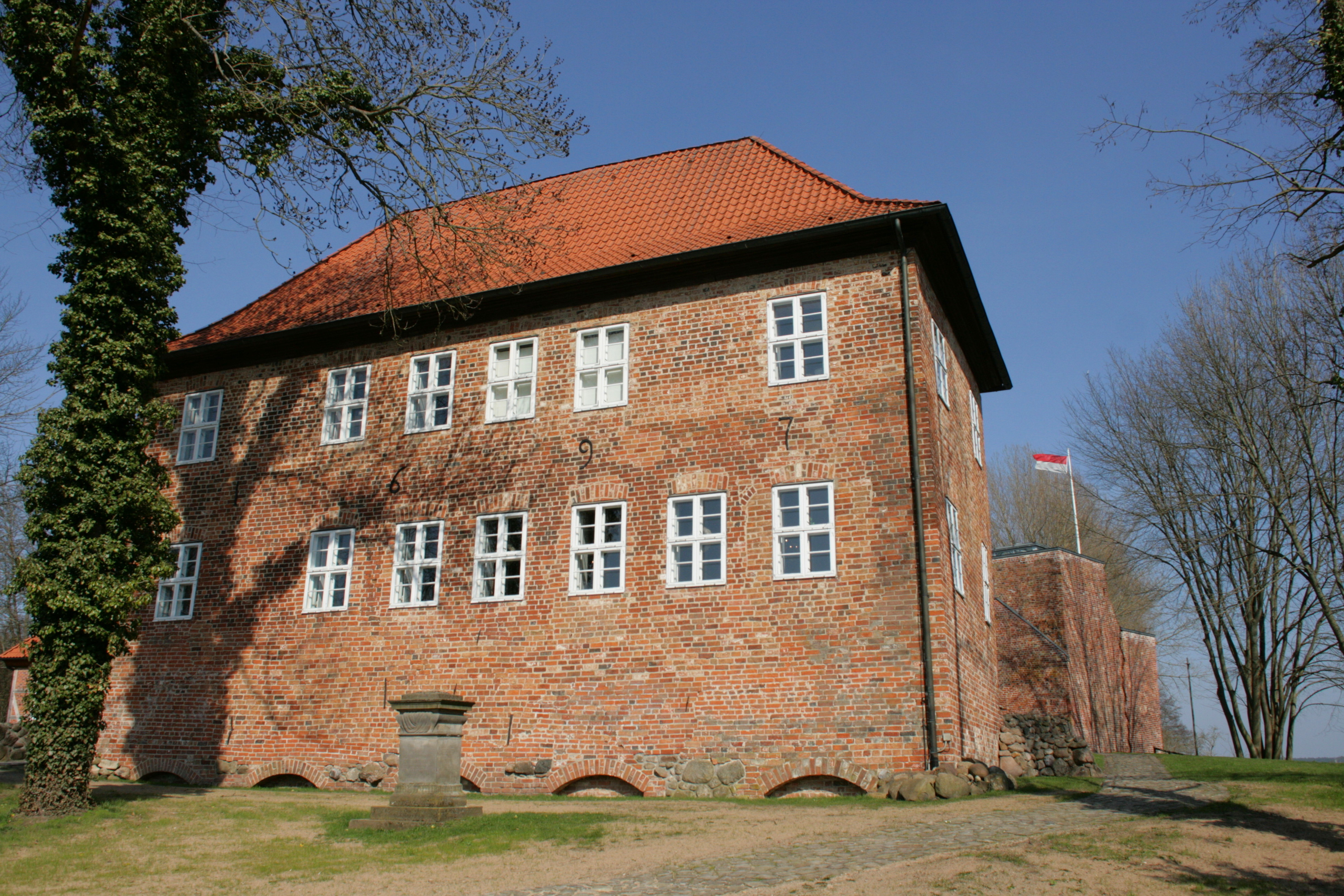 Herrenhaus mit Tourist-Information, Burg Bodenteich, Burgstraße in Bad Bodenteich